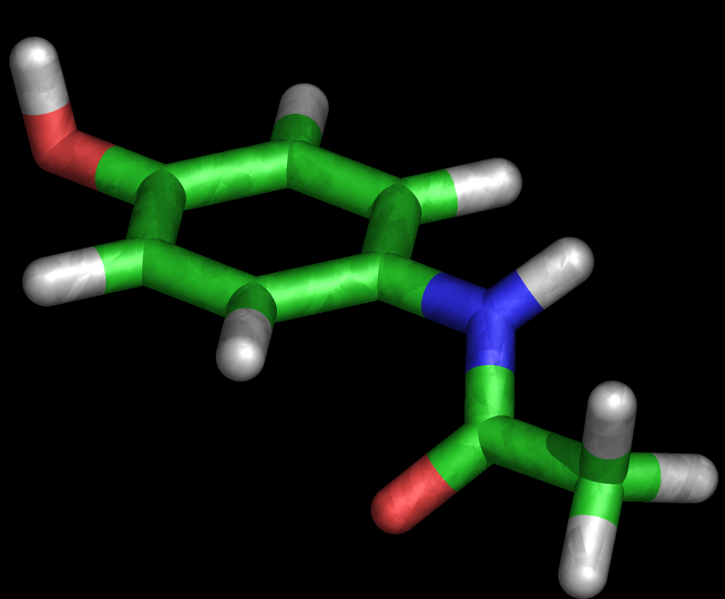 Dessin perso réalisé avec la version libre du logiciel Pymol.